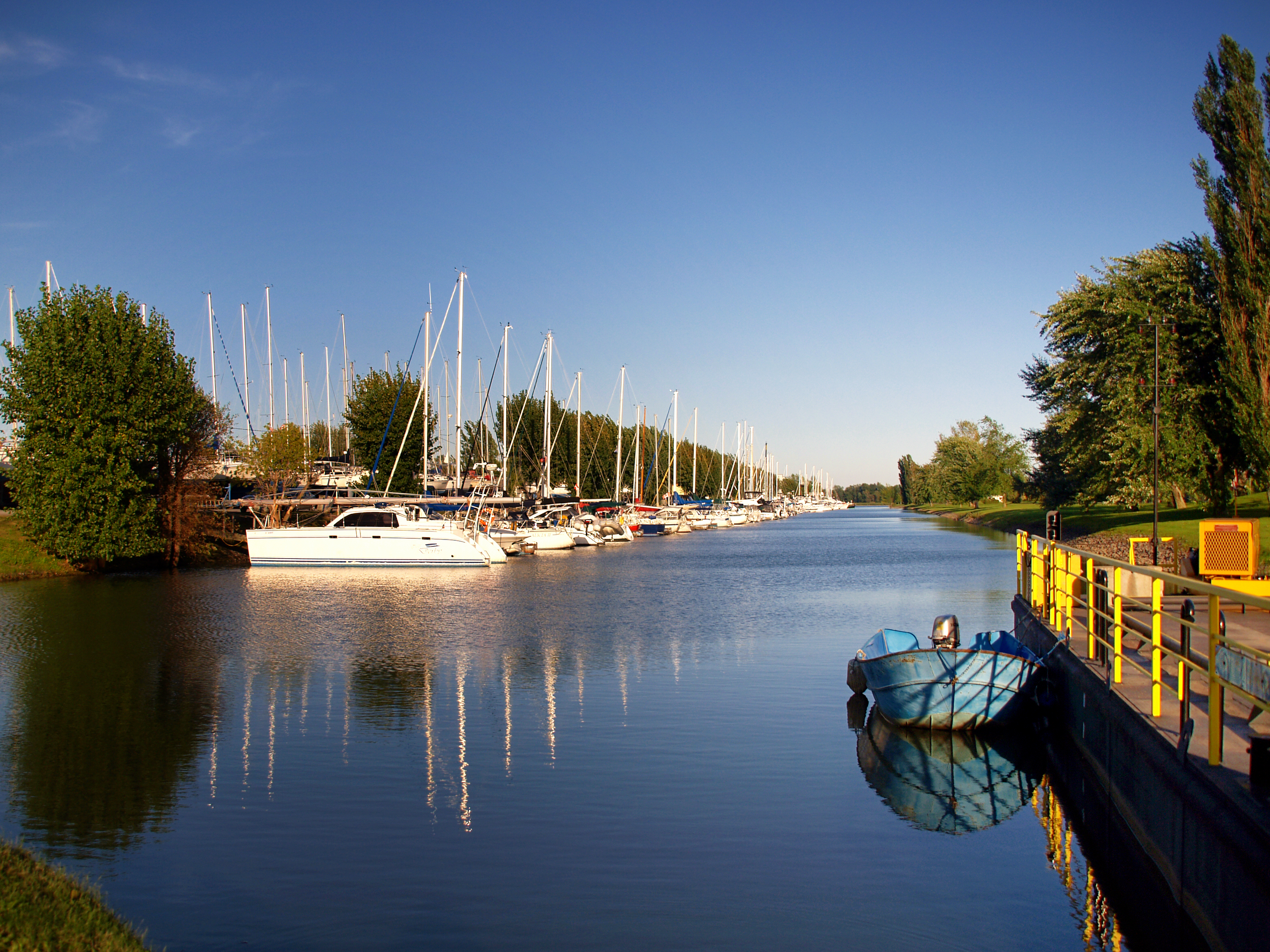 Saint-Paul-de-l'Île-aux-Noix (Québec) - Bassin nord, entre Av. 64e Est et Av. 62e